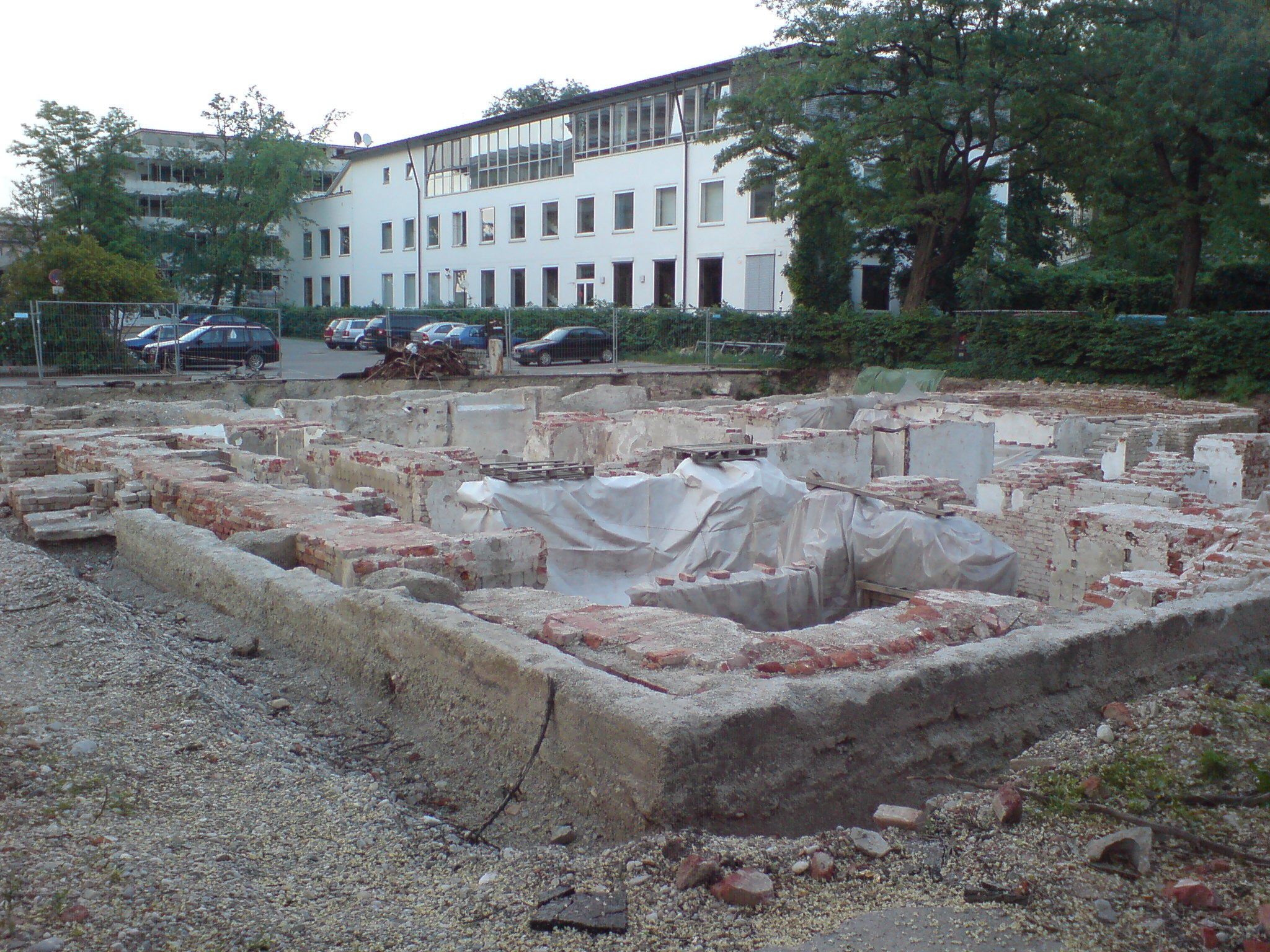 Fundament des Braunes Haus in München